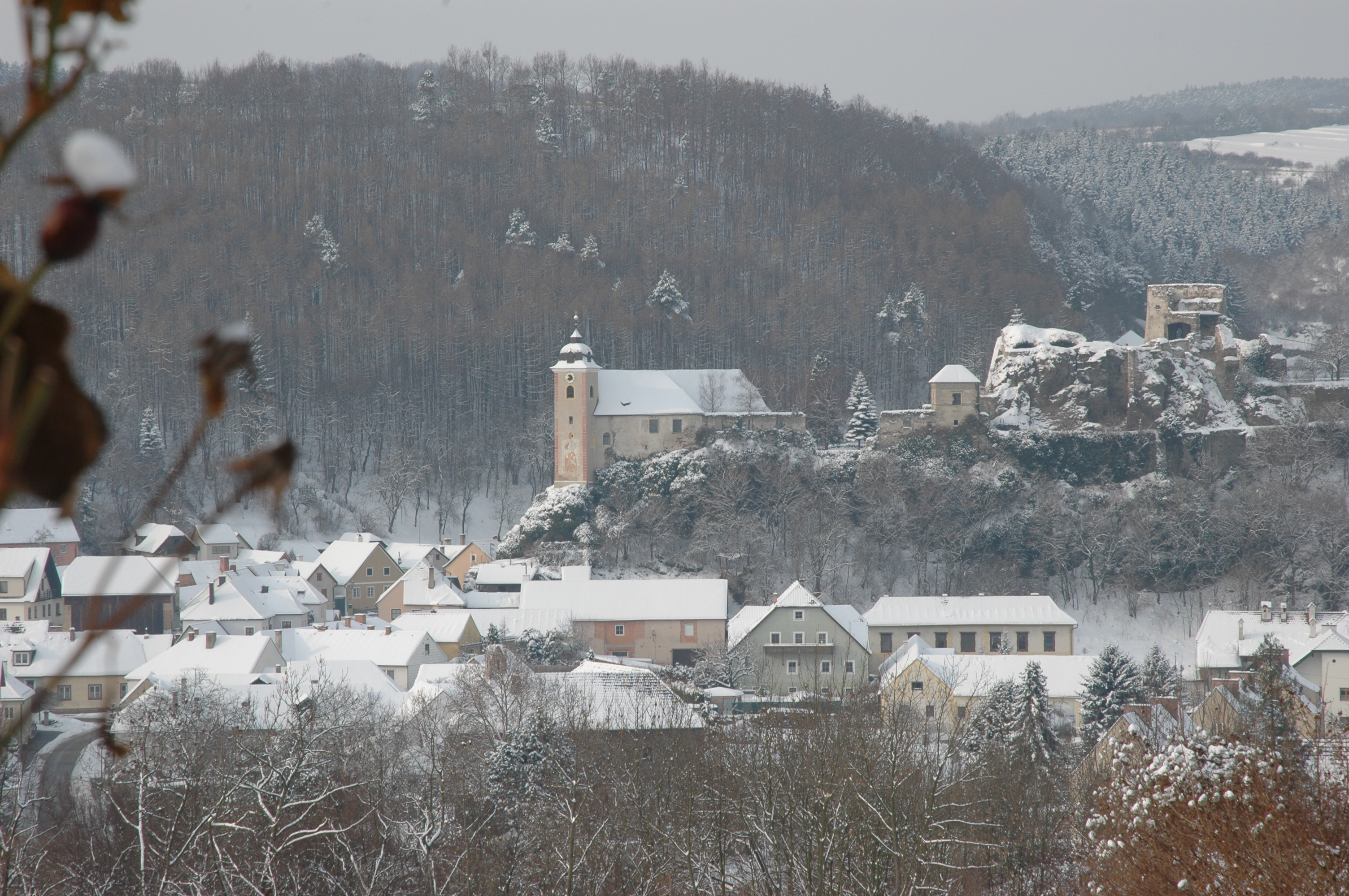 Ansicht von Rehberg im Winter, Burgkirche (links) und Ruine Rehberg (rechts), Niederösterreich